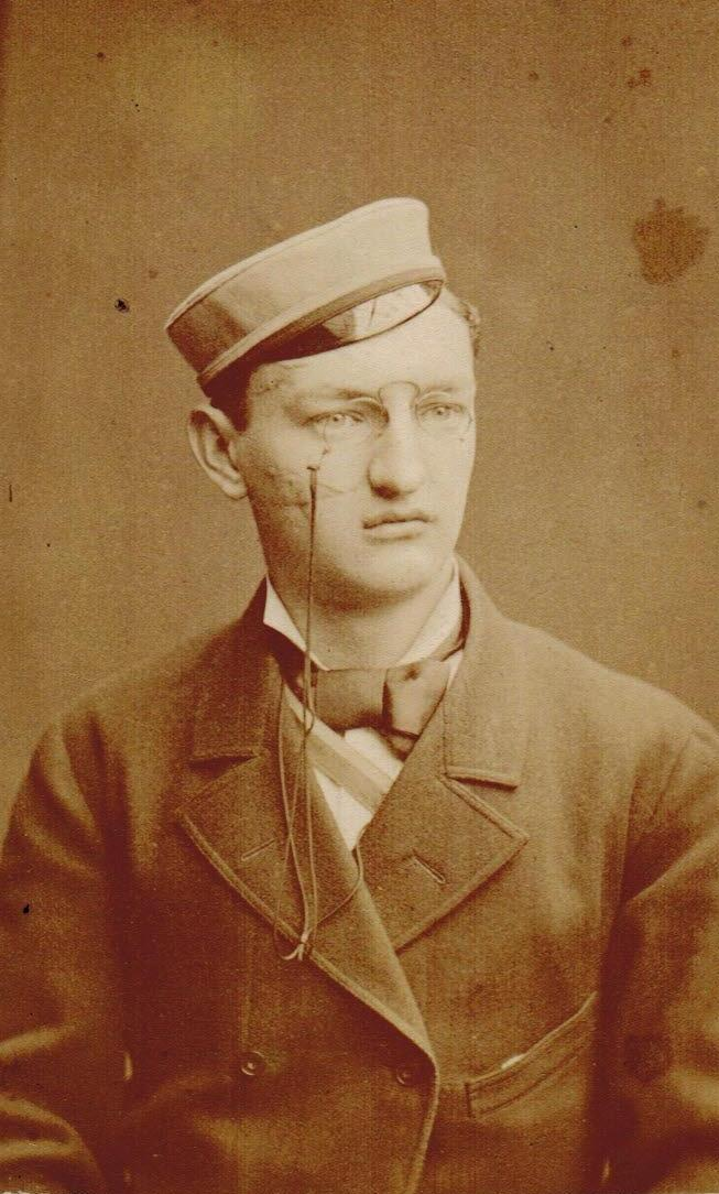 Porträtfotografie von Carl Zurburg als Student in Tübingen